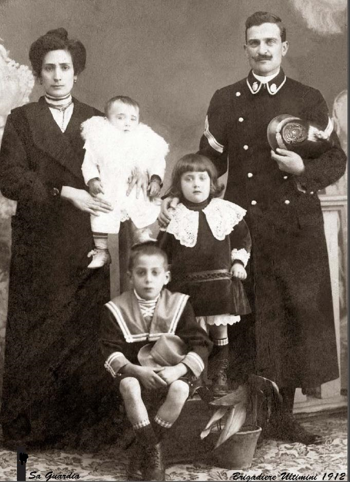 Gens de Cagliari: la famille d'un policier en 1916